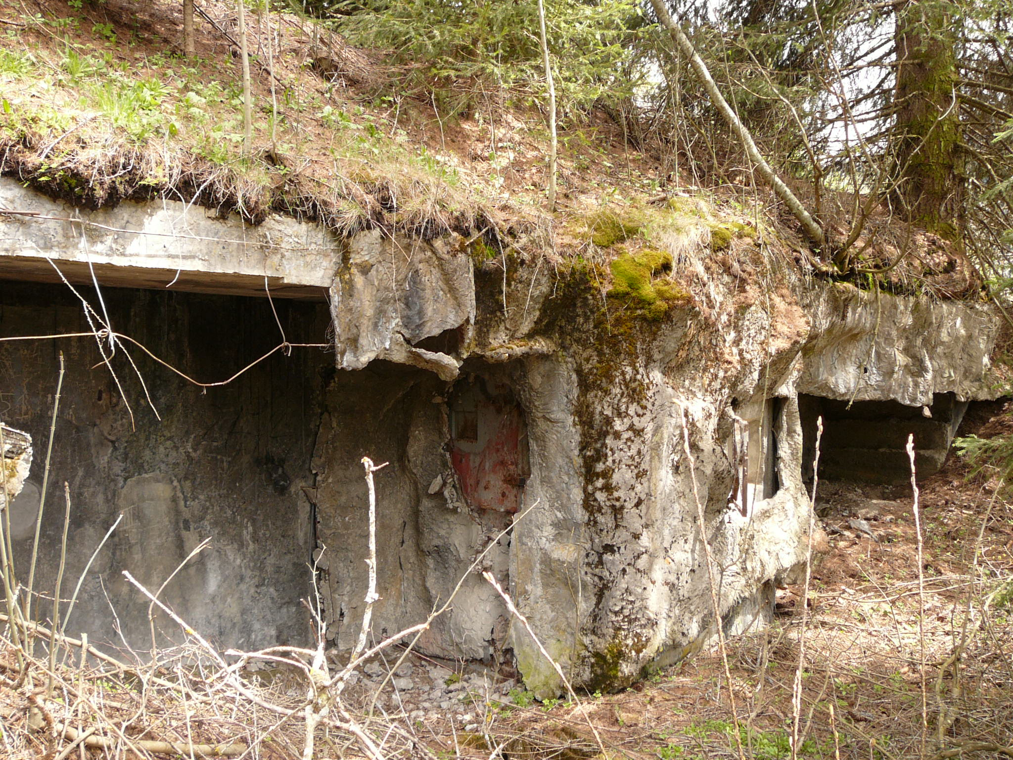 Opera 5, sbarr drava